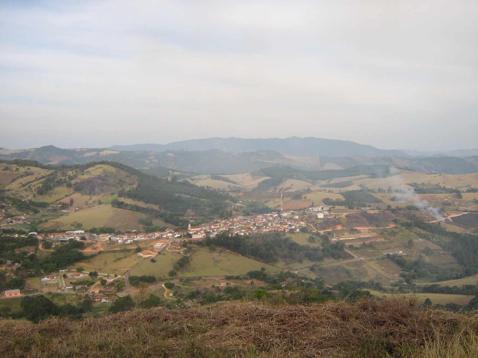 Vista panorâmica de Pedra Bela a partir da pedra que dá nome a cidade.